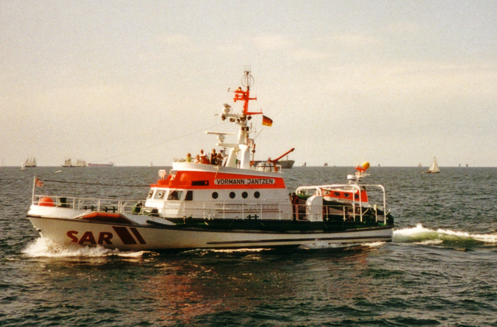 Beschreibung: SK Vormann Jantzen / Hansesail 2000